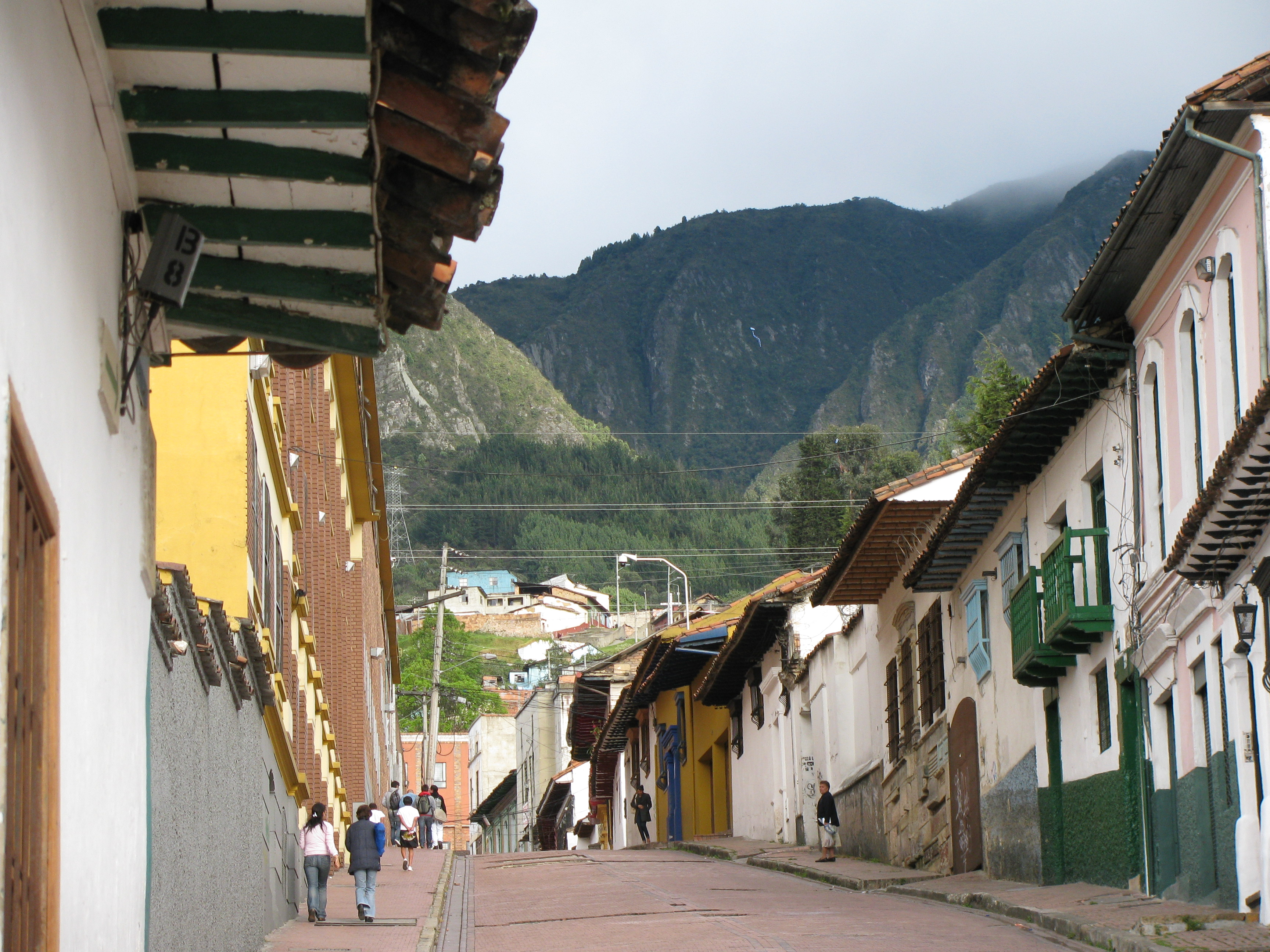 Sempre à vista, de qualquer lugar da cidade, Bogotá